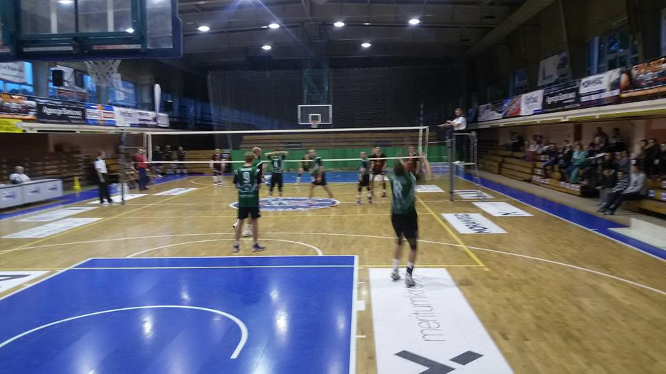 Mecz SPS Prudnik z LKS Miraż Głubczyce rozegrany 23 października 2016, który zakończył się wygraną Prudnika 3:0.